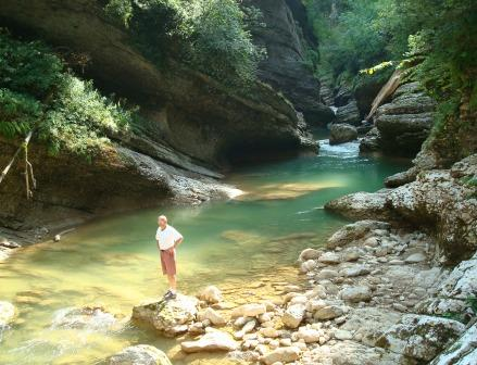 Река Курджипс в Гуамском ущелье. Апшеронский район Краснодарского края